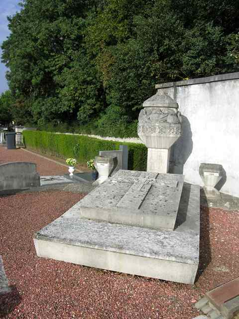 Zaventem Burchtstraat Begraafplaats Derscheid